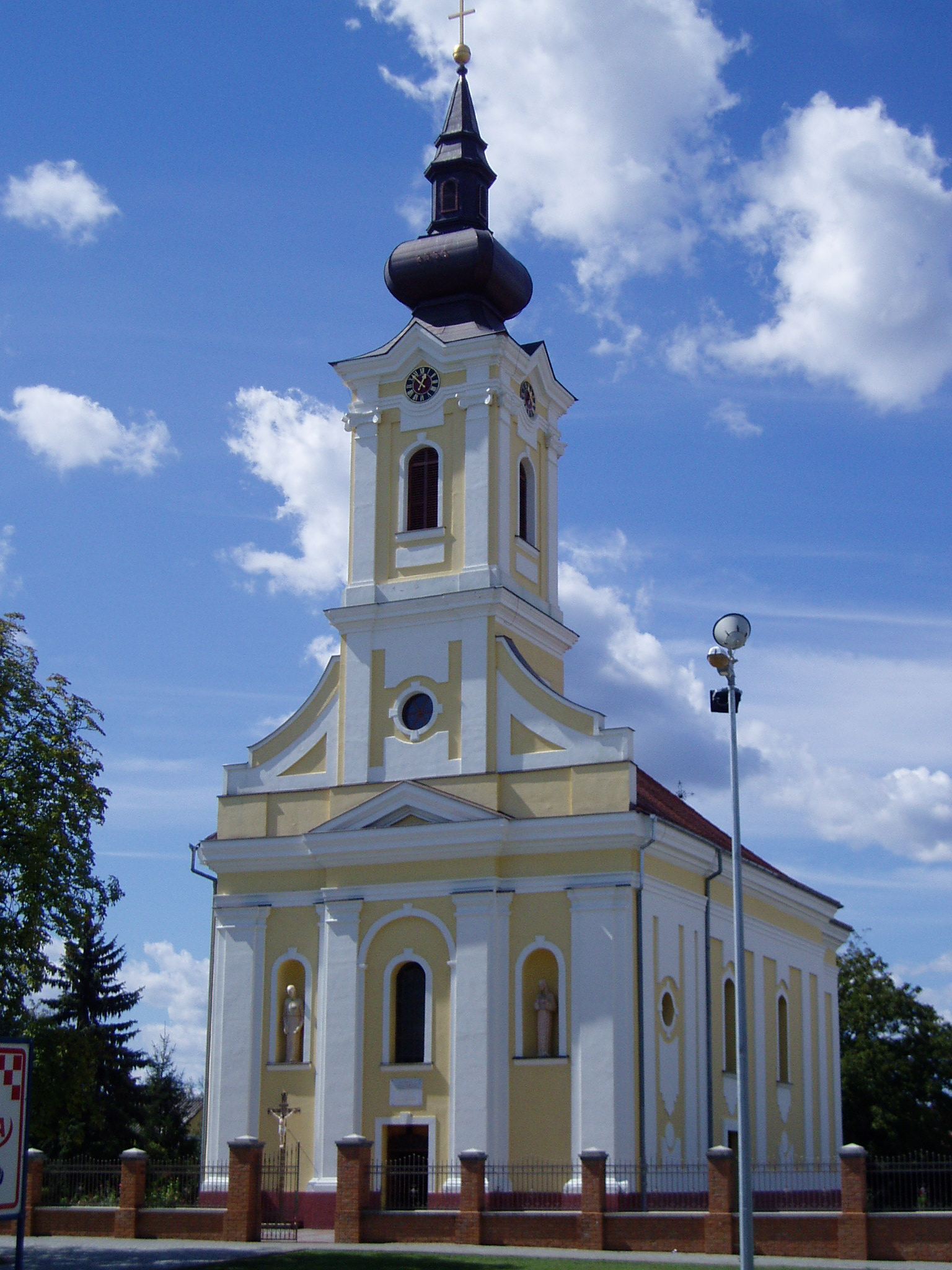 Crkva u Vrbanji